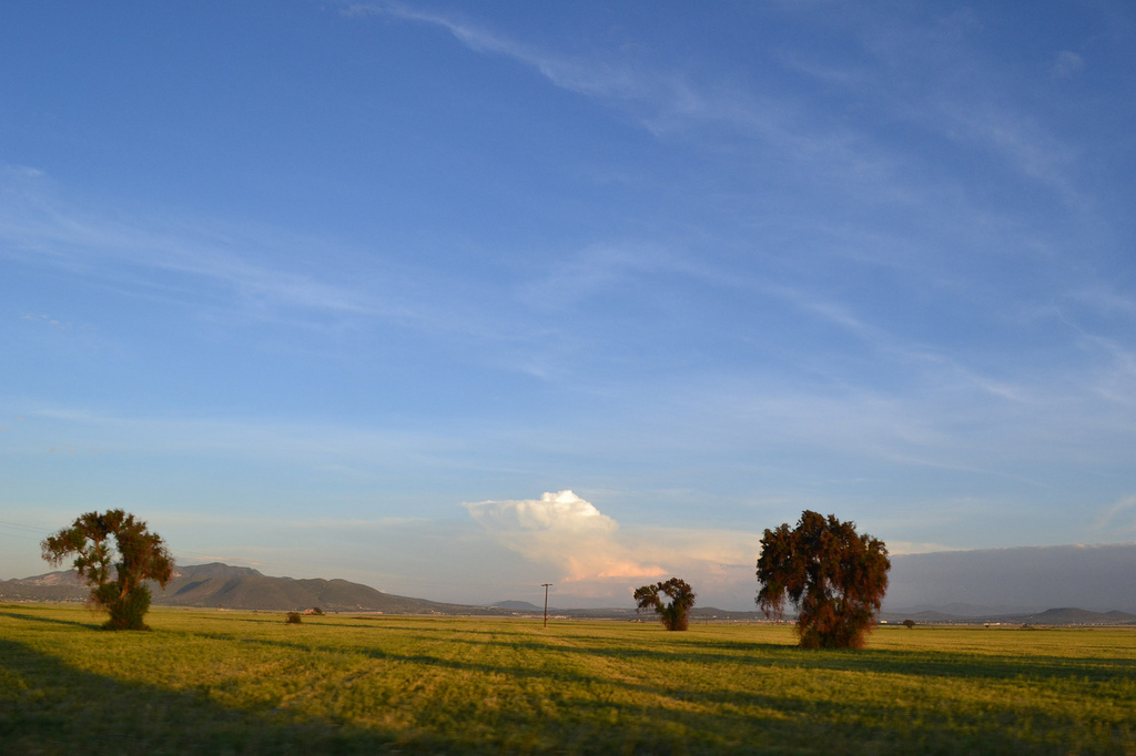 Una fotografía desde la carretera: Valle de Tizayuca en Hidalgo, México. Me gusta ese lugar con su combinación de grandes espacios abiertos, cebada y luz. Espero pronto tomarme el tiempo para fotografíar el valle como yo quisiera